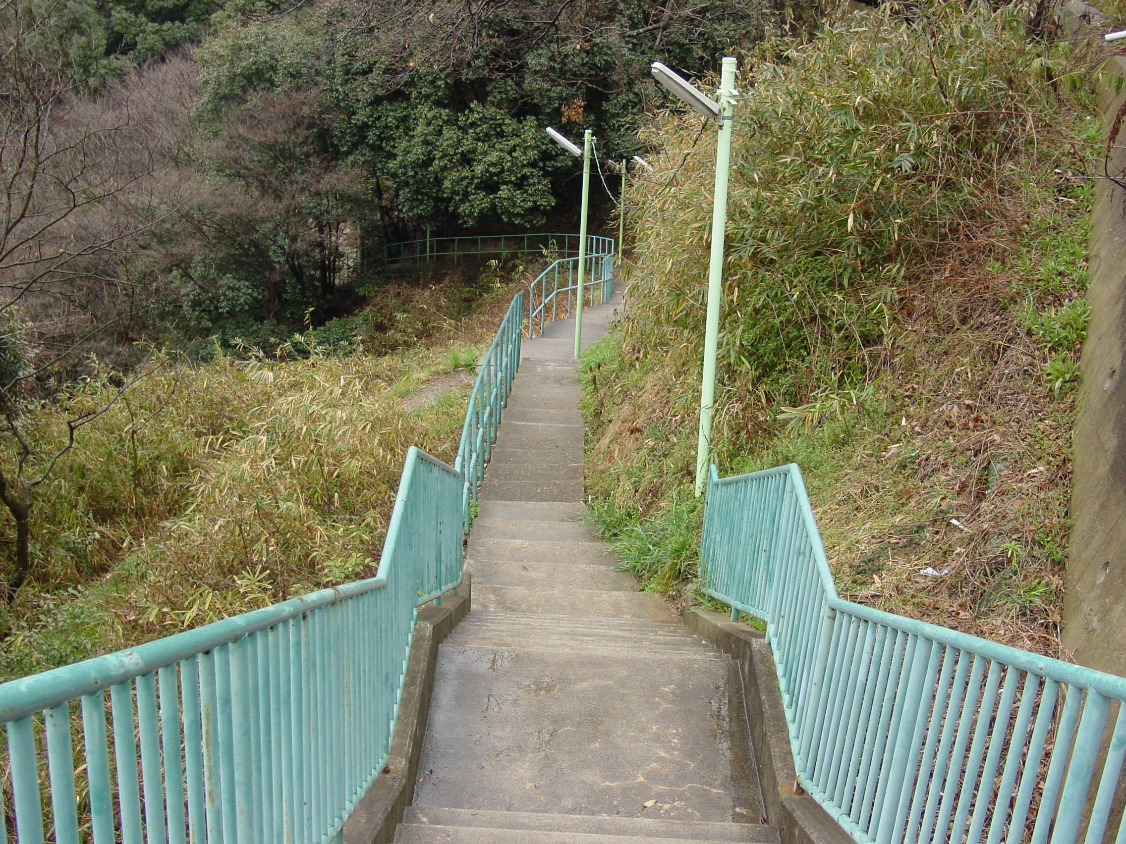 地平部へと続く階段